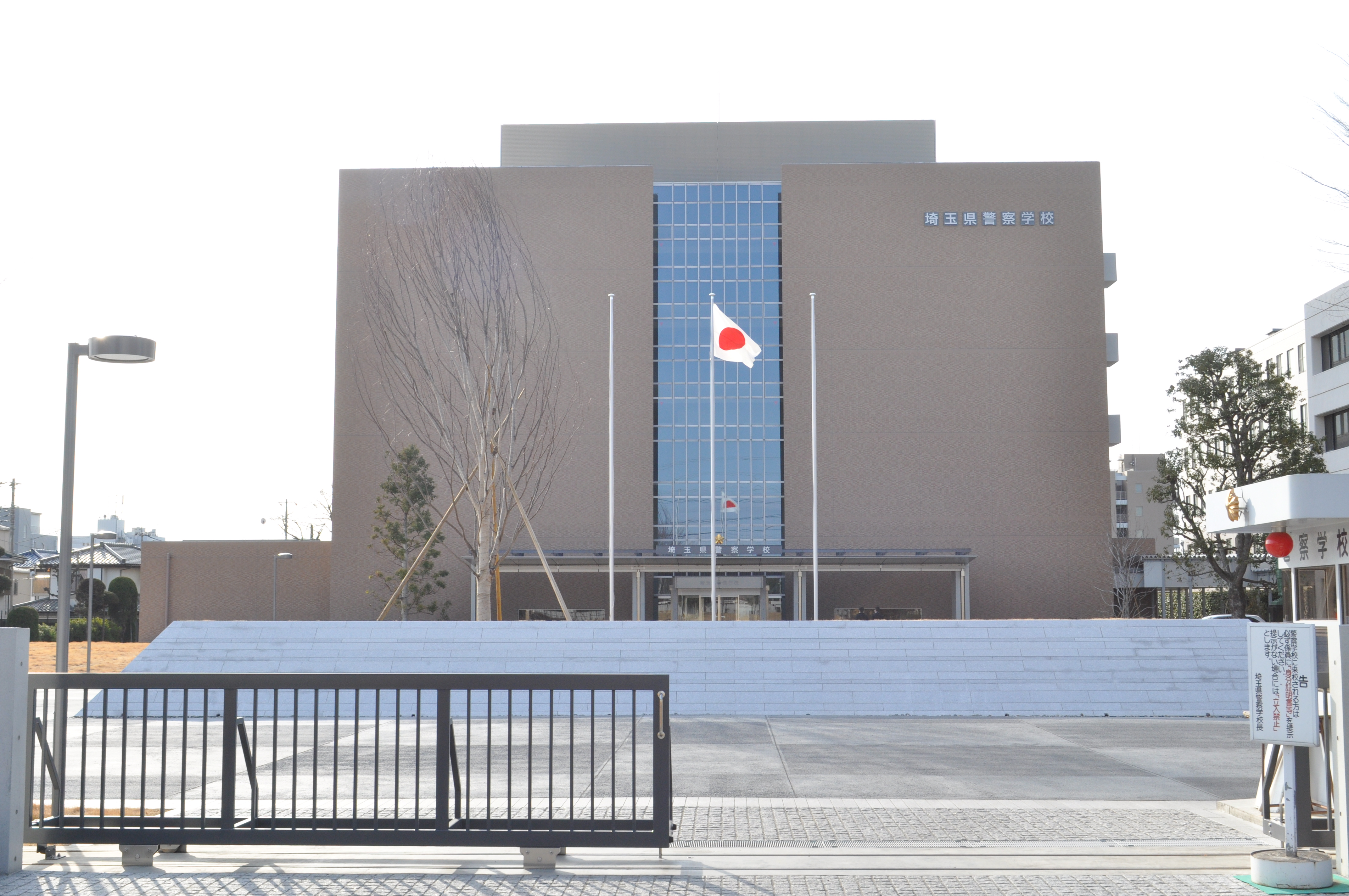 埼玉県警察学校